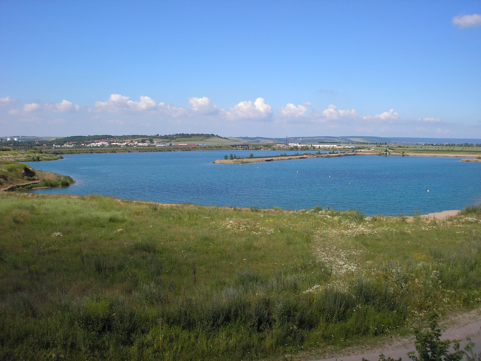 Blick über den Schwerborner See bei Erfurt, im Hintergrund der Rote Berg.